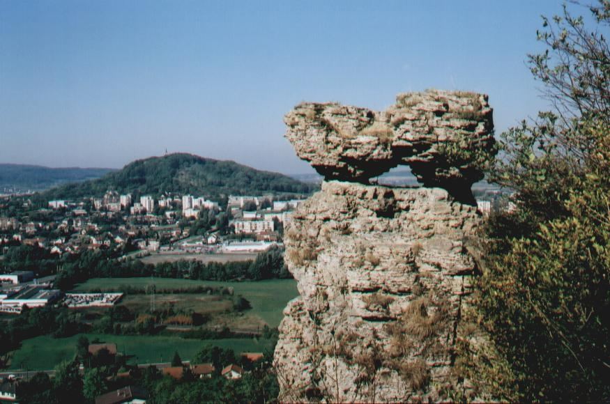 Le sabot de Frotey, et en arrière-plan, la Motte de Vesoul